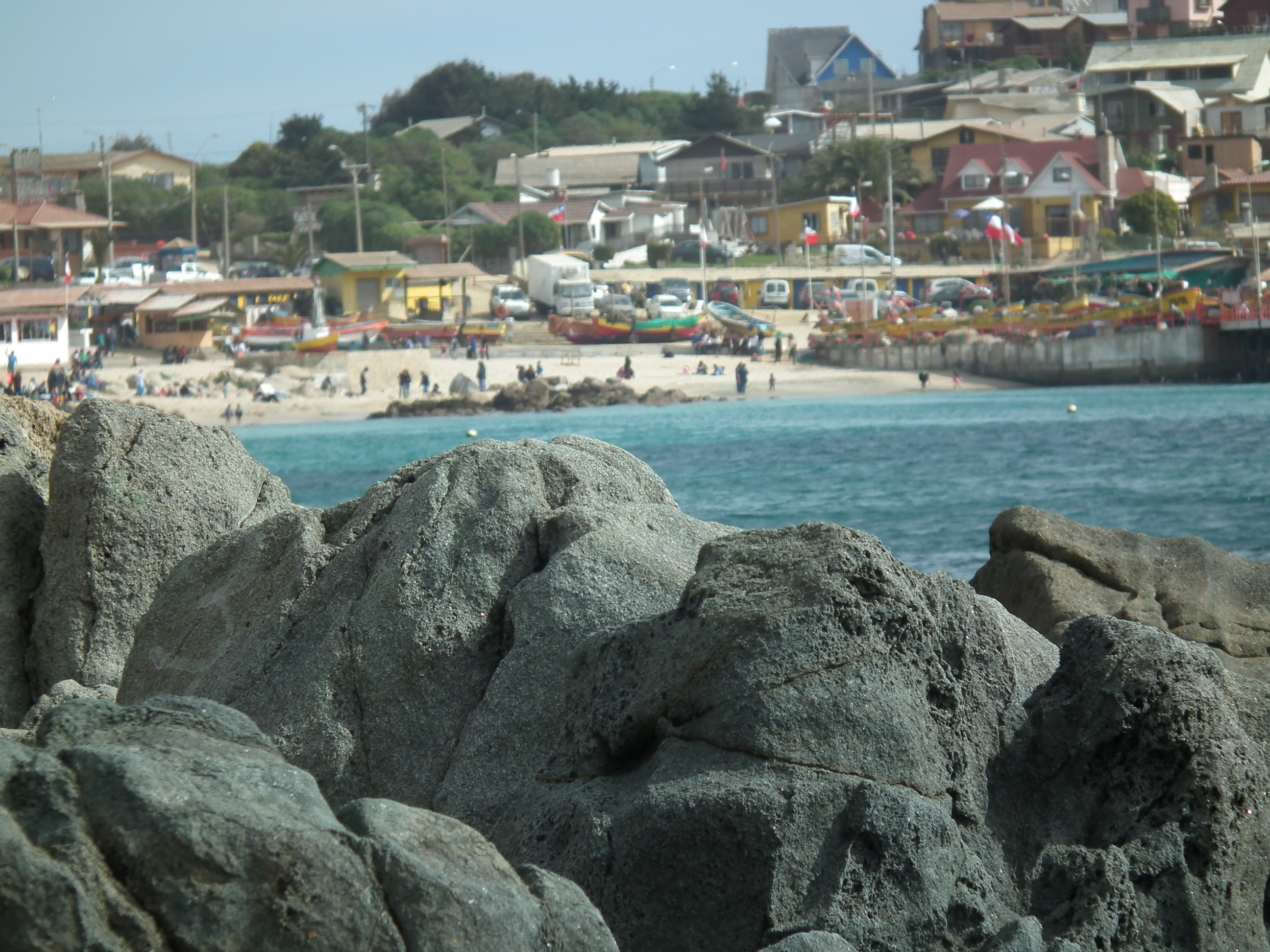 Caleta de Pescadores de El Quisco con el muelle nuevo. Se alcanza a ver la Playa